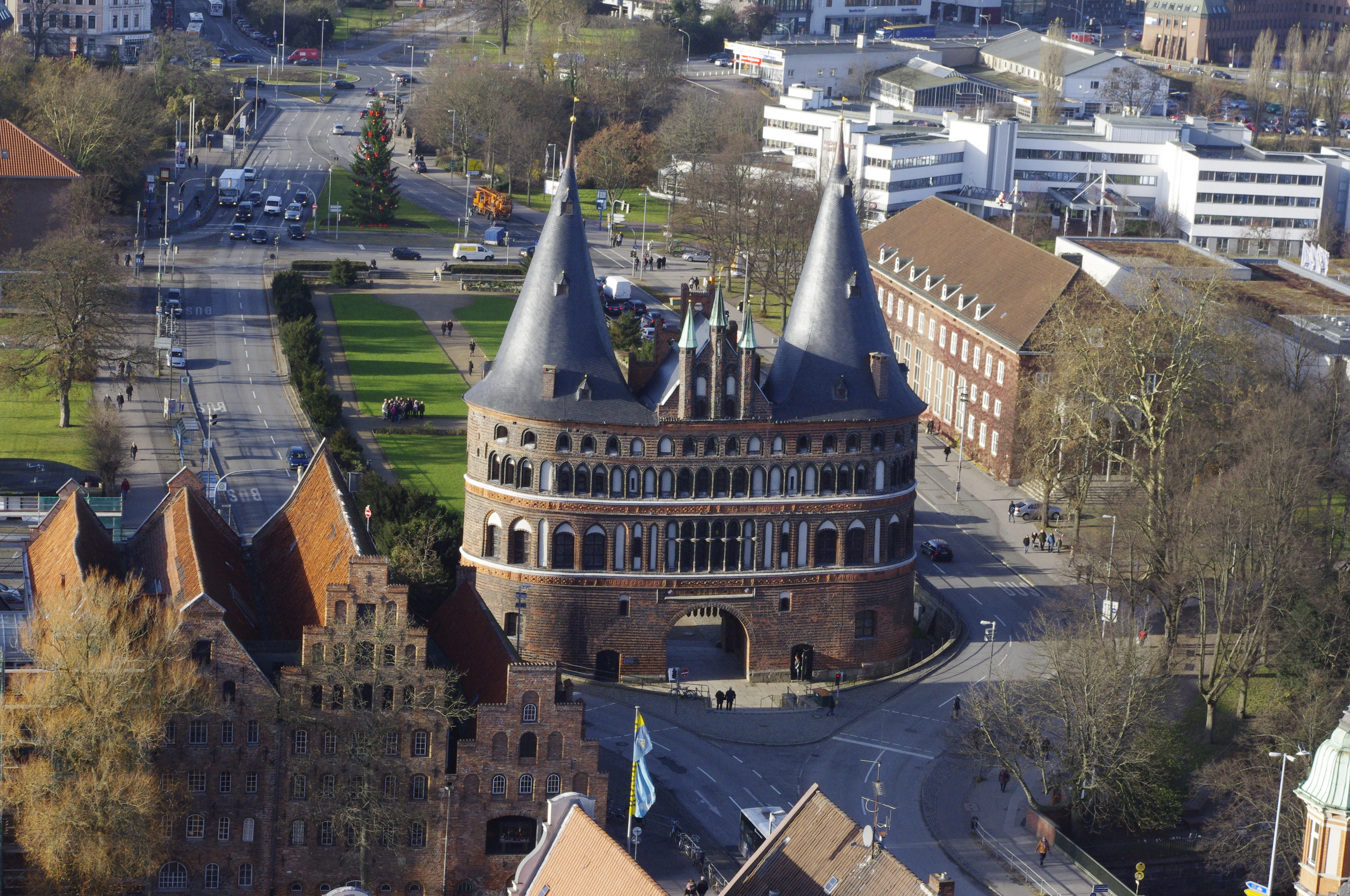 Blick vom Turm Sankt Petri, Lübeck.